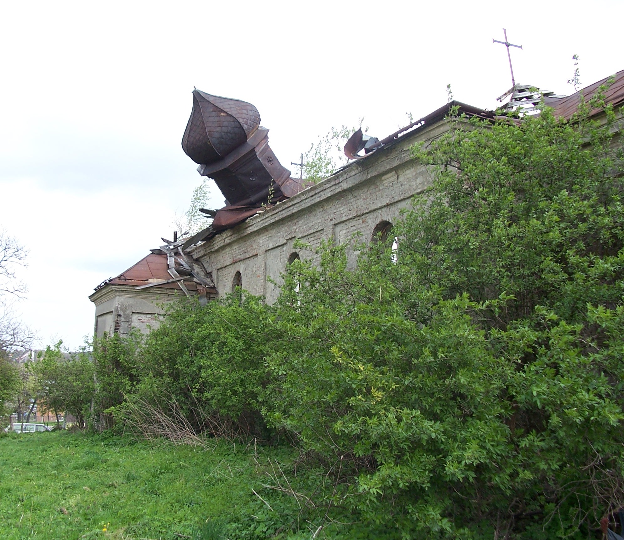 Ujkowice-zrujnowana cerkiew